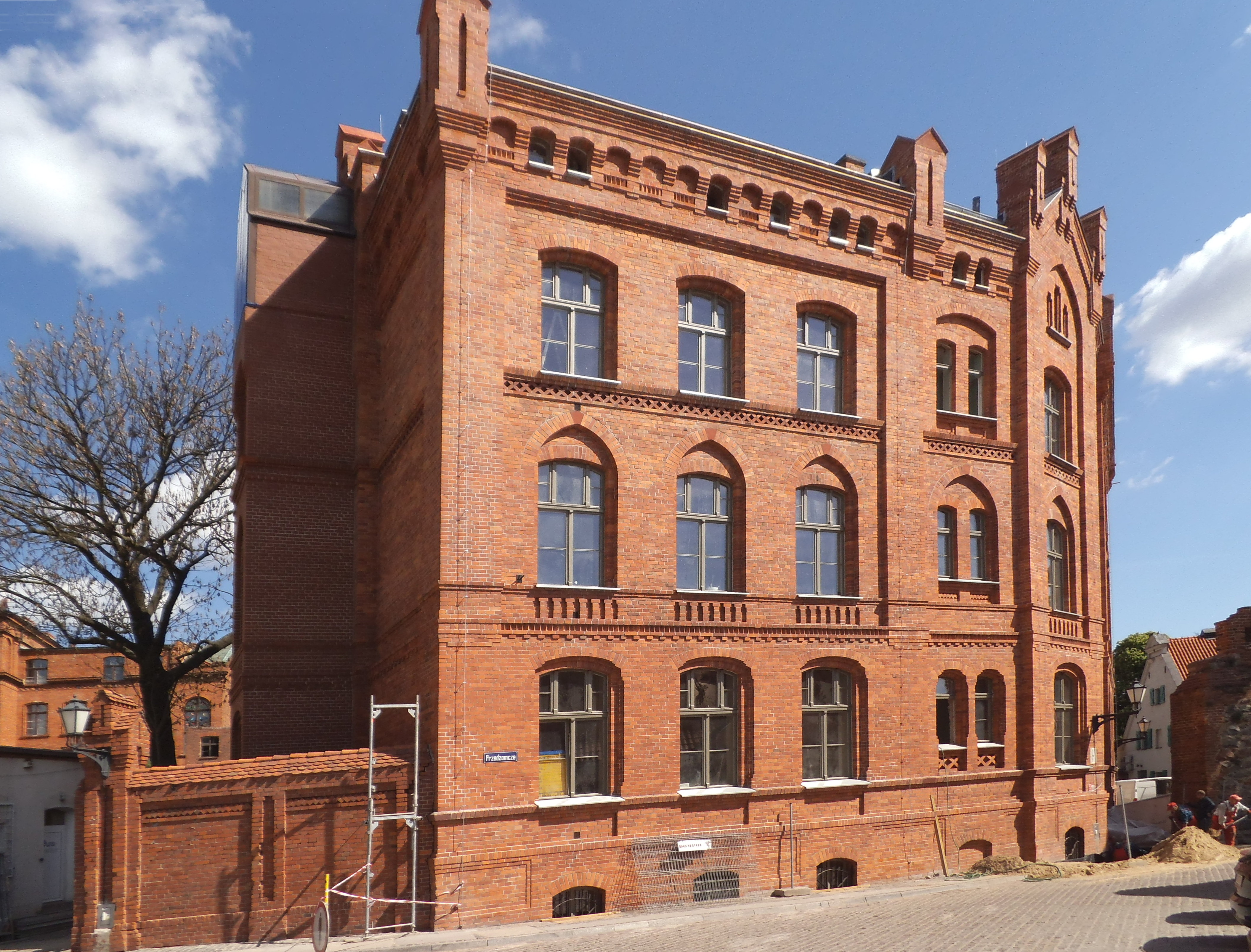 Regionalny Inkubator Przedsiębiorczości - Toruń